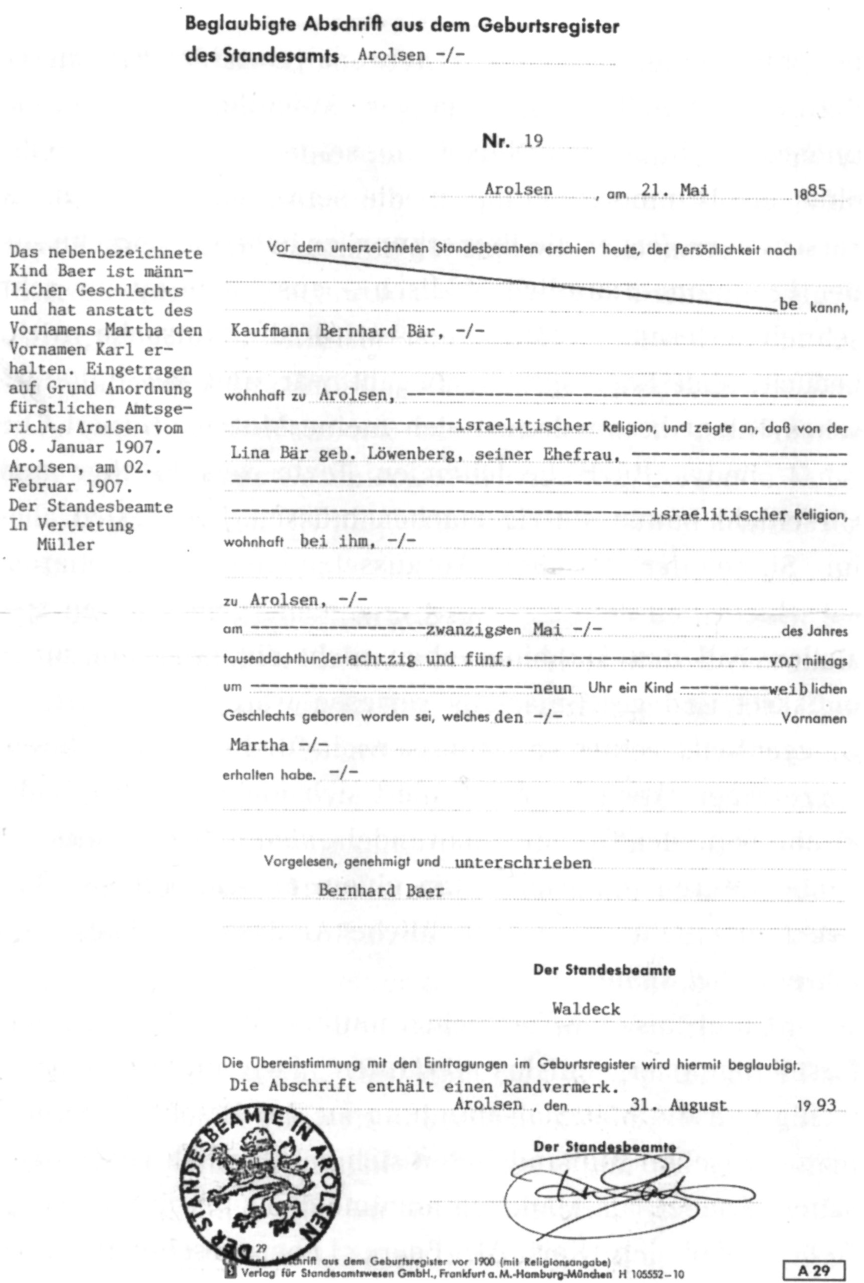 Beglaubigte Abschrift aus dem Geburtsregister der Stadt Arolsen vom 31. August 1993: Geburt des Kindes Martha Baer am 20. Mai 1885, Geschlechts- und Namenskorrektur am 2. Feb. 1907 wegen irrtümlichen Eintrags aufgrund von Pseudohermaphroditismus